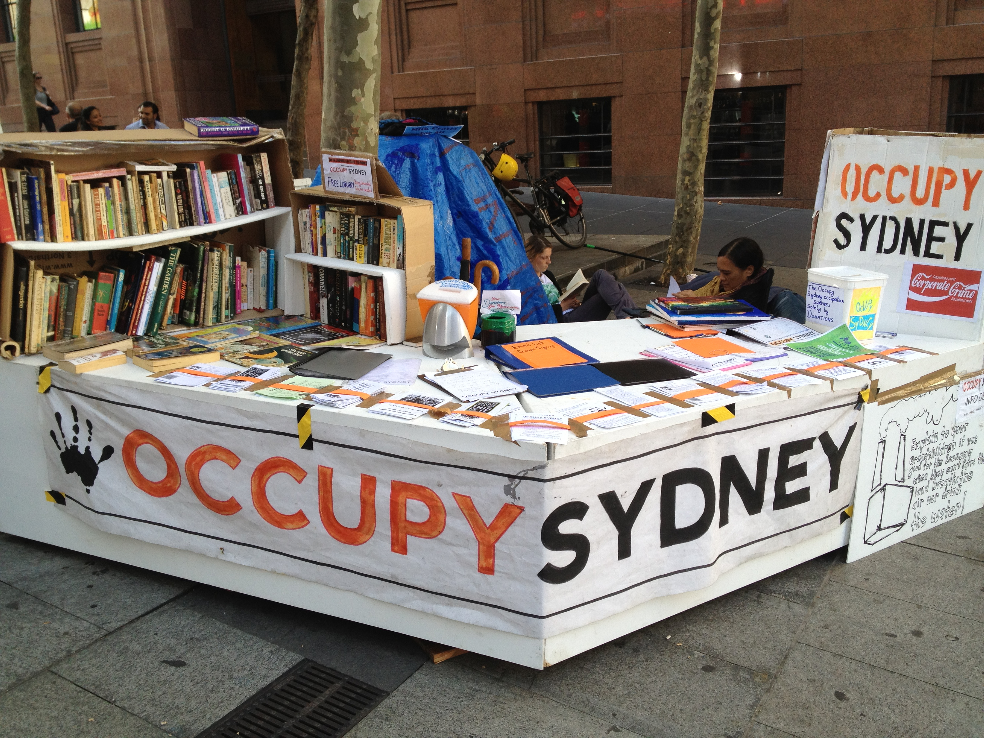 Occupy Sydney 2012